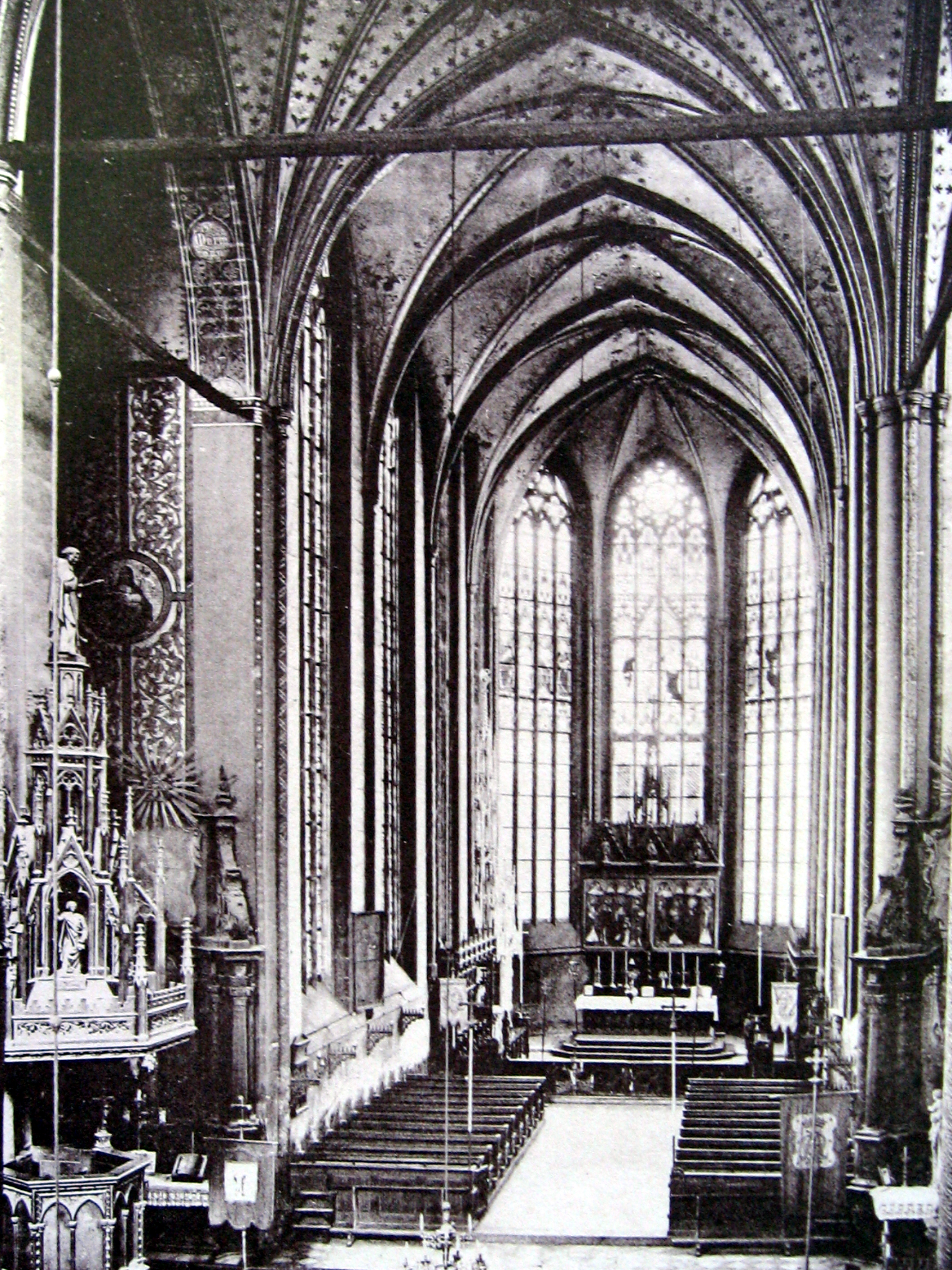 Propsteikirche 1894 Innenansicht